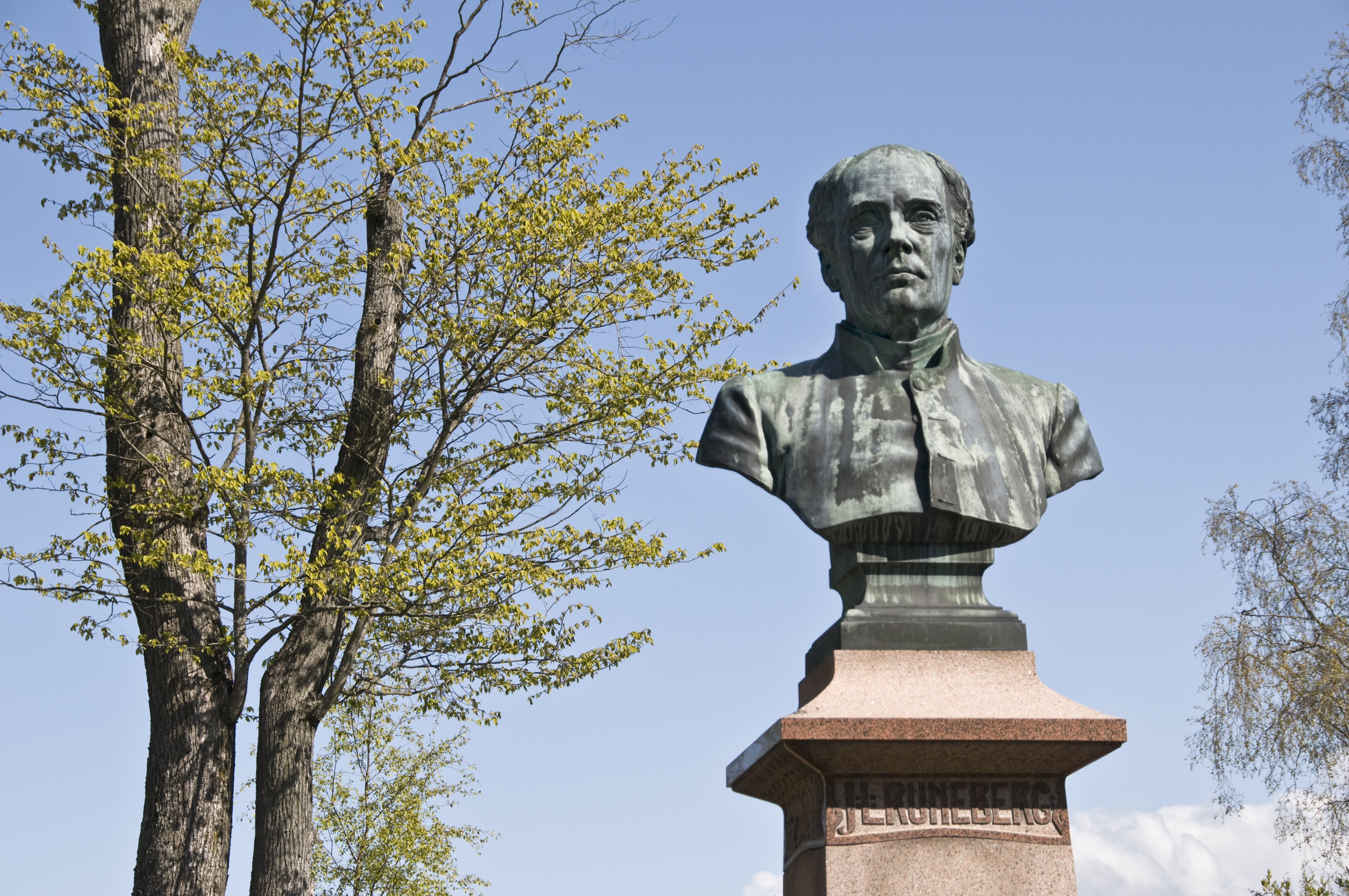 Johan Ludwig Runebergin rintakuva